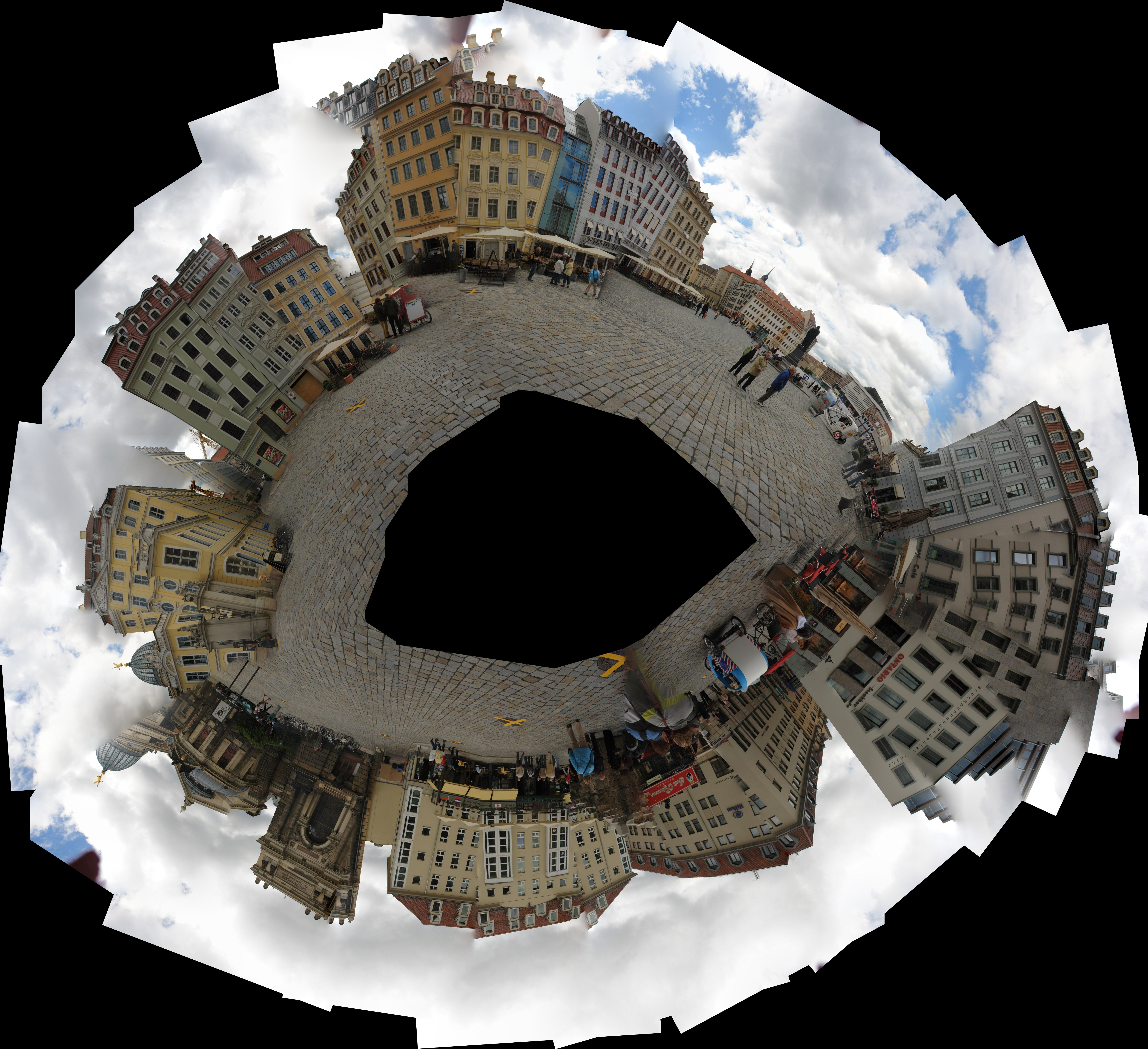 Neumarkt in Dresden fehlerhaft zusammenmontiertes Panorama